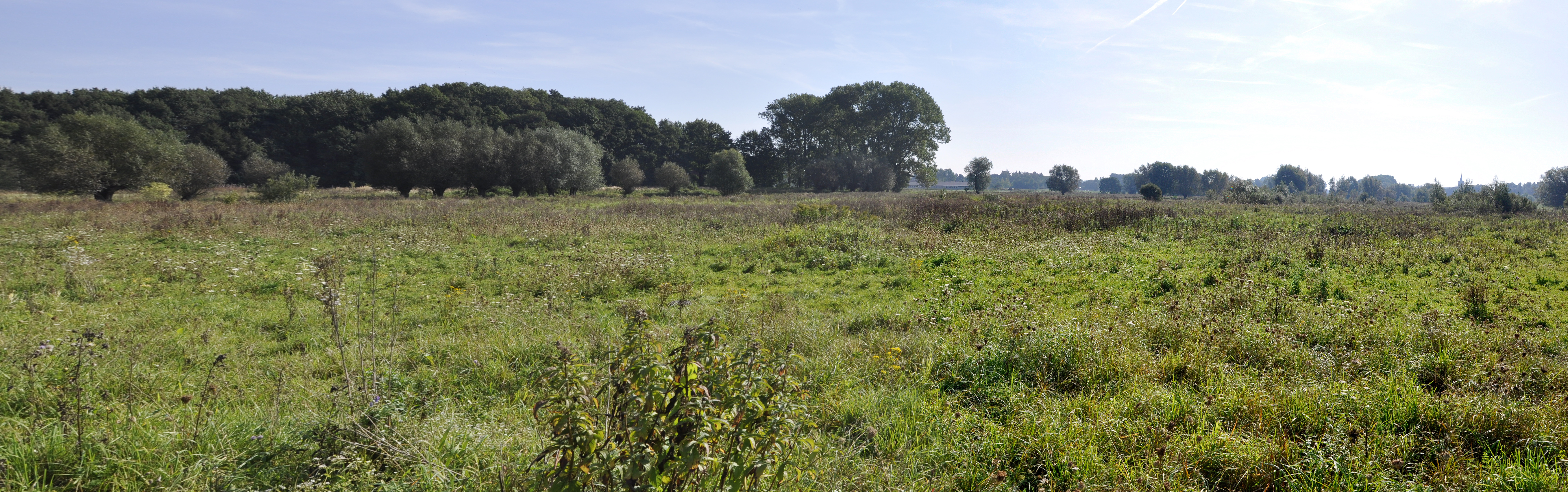 Het natuurreservaat Kalverbos in de Belgische plaats Heusden (Destelbergen)